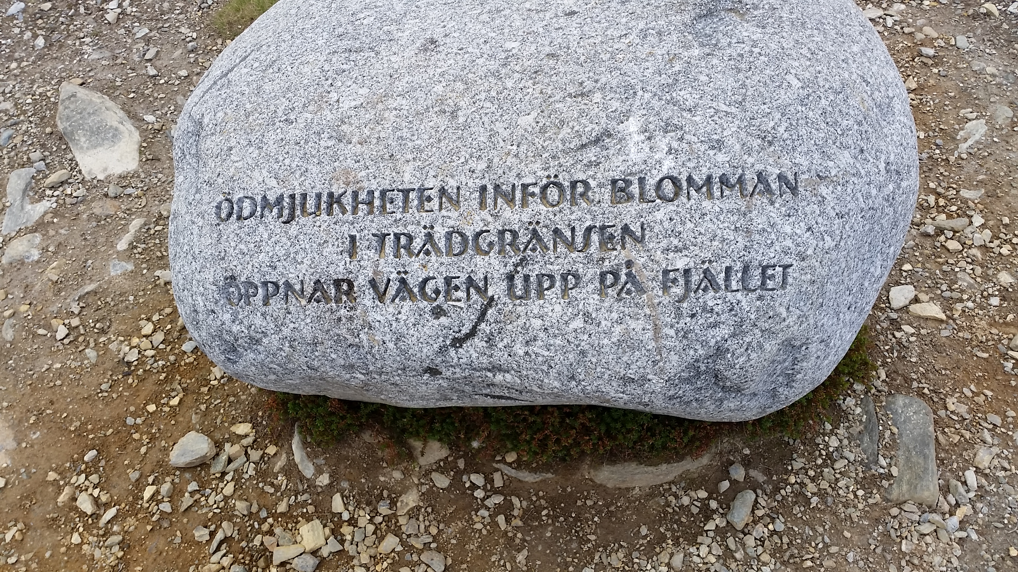 Meditationsplats längs Dag Hammarskjöldsleden, invid Kieronbacken.